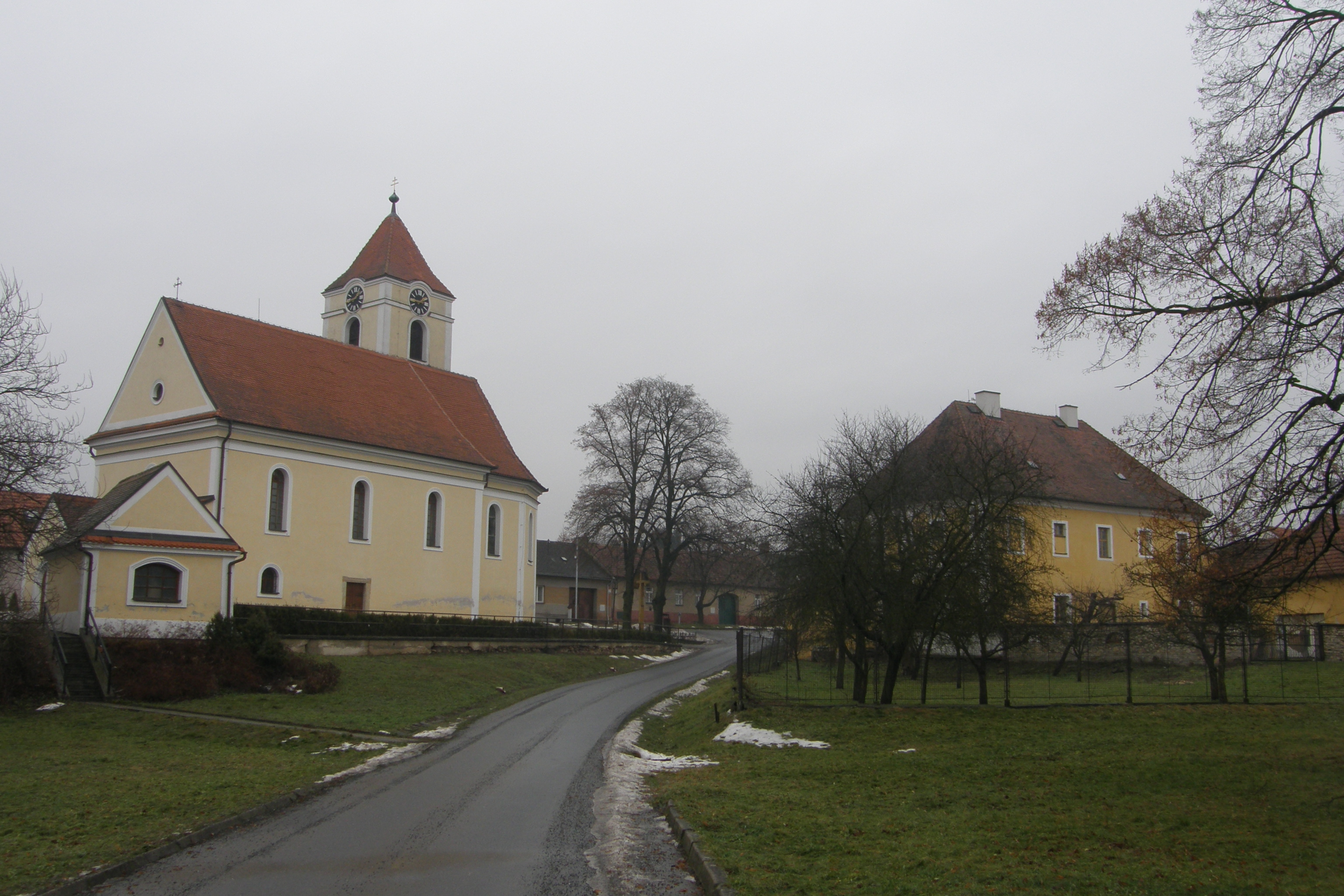 Kostel svatého Filipa a Jakuba a fara v Cetkovicích